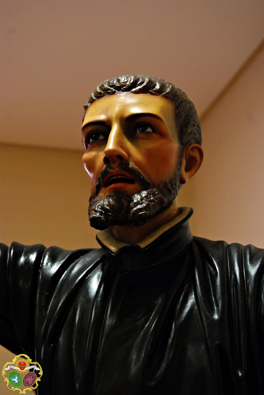 Nuestro Titular San Francisco Javier.